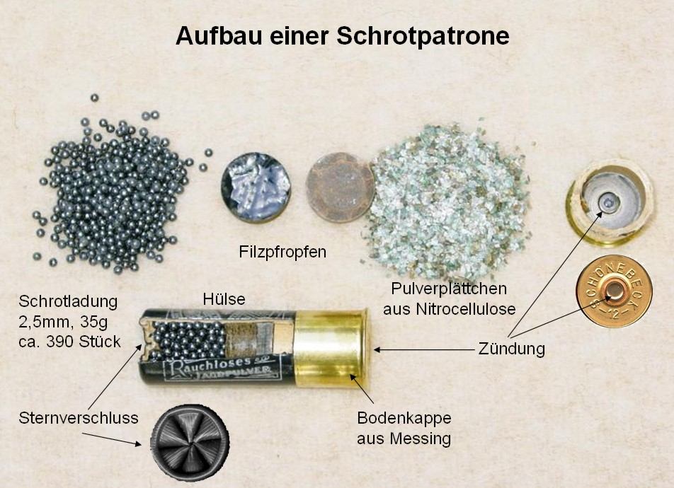 Aufbau einer Schrotpatrone, Papphülse Foto Joachim Baecker 2005/09/24 Gerade bei Schrotpatronen spricht man im allgemeinen nicht von "Zündhütchen" sondern von "Zündung". Die heute gebräuchlichen Zündungen unterscheidet man in "verdeckte Zündung" und "Mediumzündung".